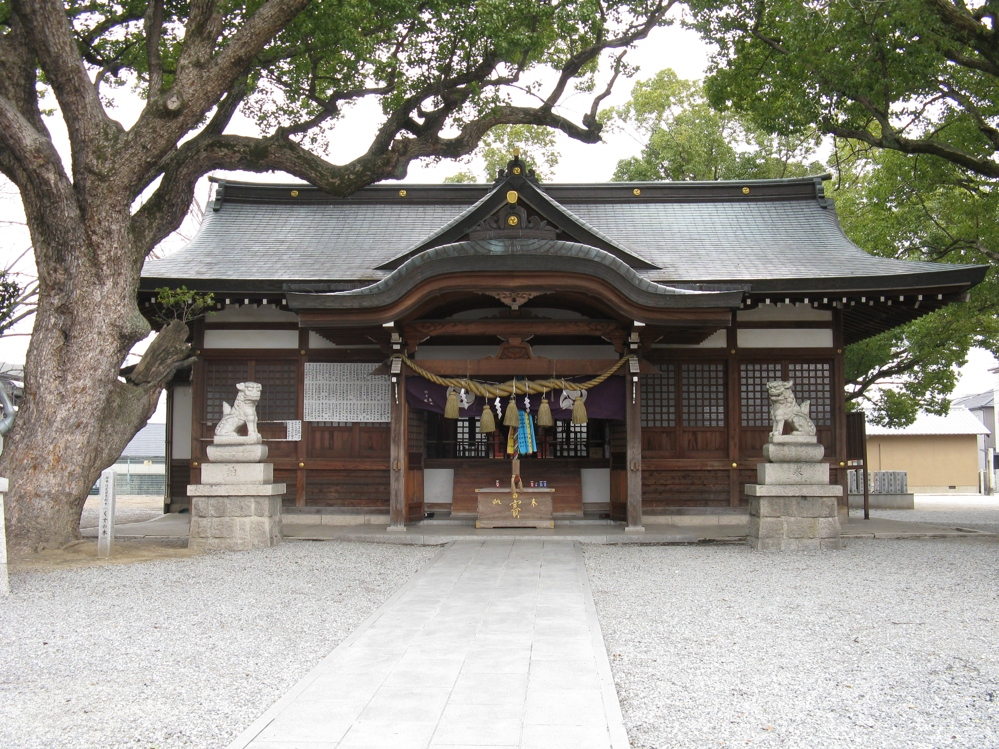 金岡神社 拝殿